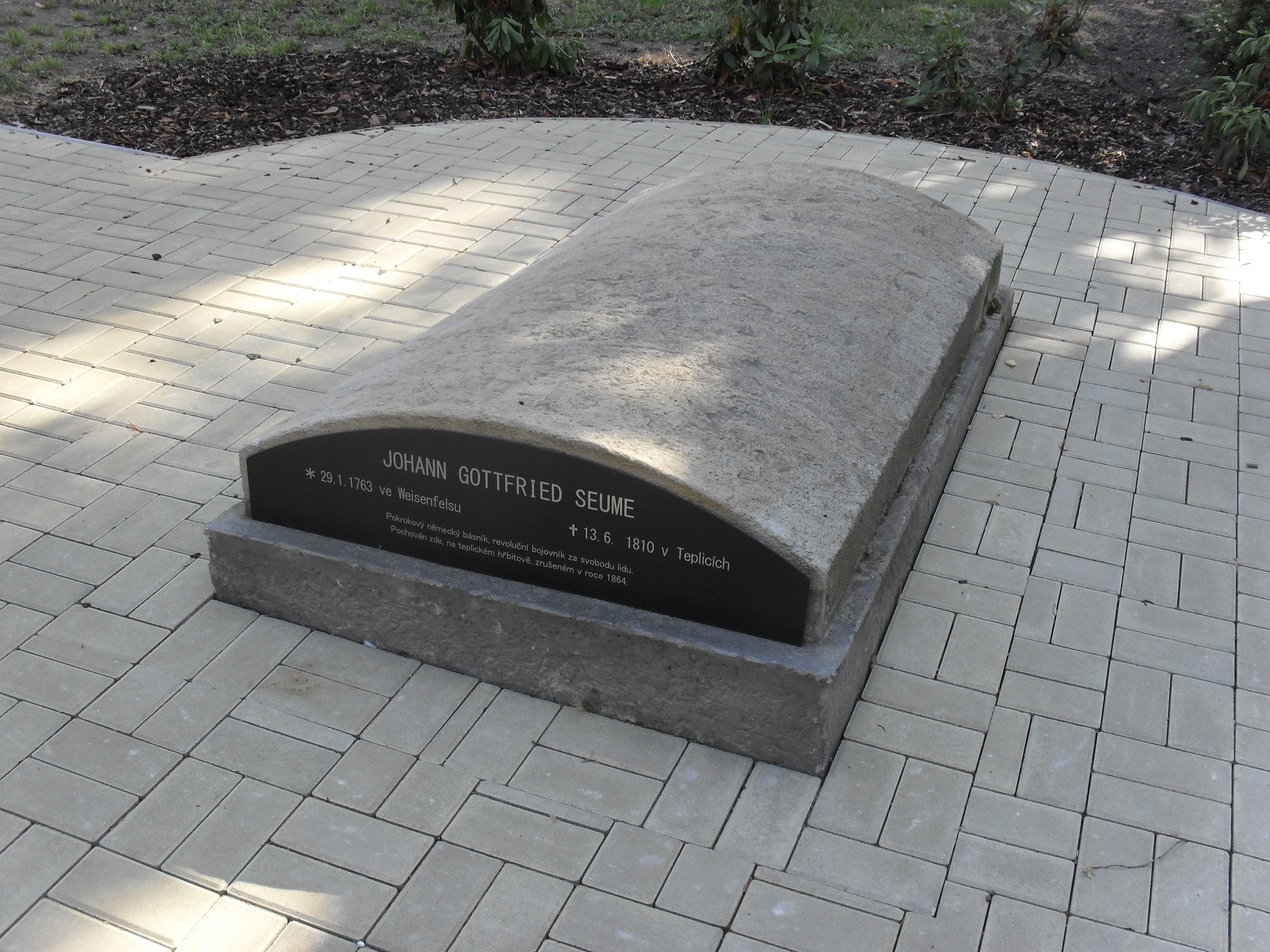 Kaple Nalezení sv. Kříže, tzv. Seumeho kaple (Teplice)- Havlíčkovy sady, Teplice